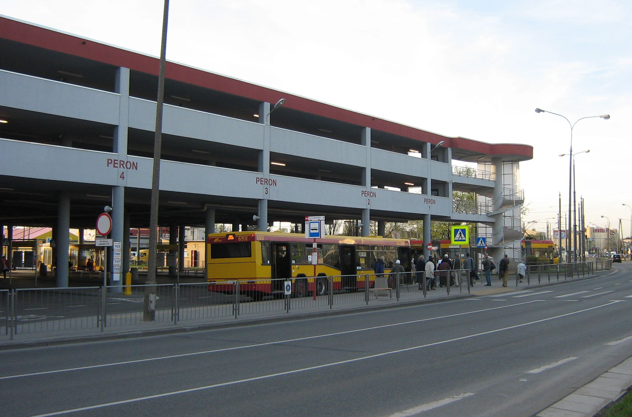 System P+R Al. Krakowska na warszawskim Okęciu: parking, zespół pętla autobusowa i pętla tramwajowa